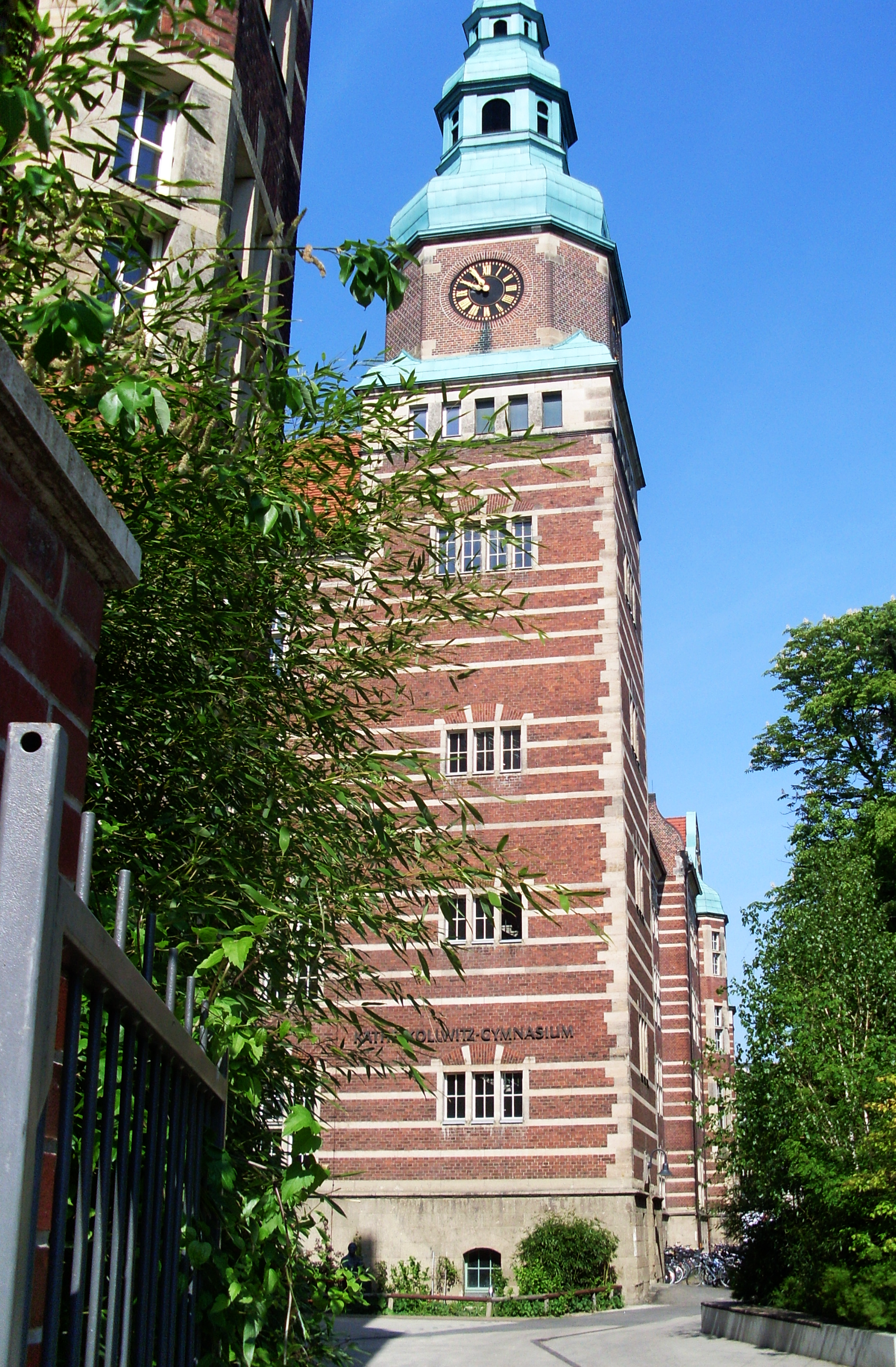 Aufnahme der Käthe-Kollwitz-Oberschule von der Dunckerstraße aus